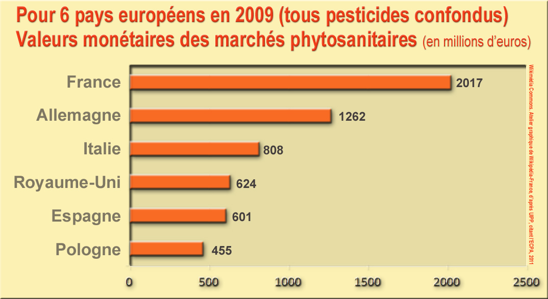 Graphique représentant pour 6 pays européens, les valeurs monétaires (en millions d’euros) des marchés phytosanitaires, pour 4 types de pesticides (Insecticide, fongicide, désherbant, divers, ces 4 produits étant confondus dans une même barre du graphique) pour l'année 2009, selon l'UIPP, citant l'ECPA (association européenne des firmes phytosanitaires, pour "European Crop Protection Association") comme source